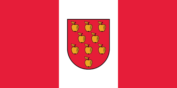 Krimuldas novada karogs